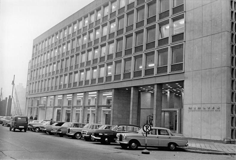 Berlin, Bürogebäude, "Wiratex-Gebäude" Zentralbild Krueger Ku-Schä 30.11.1964 Berlin: Einweihungsfeier bei "Wiratex" Blick auf das am 30.11.1964 feierlich übergebene Gebäude der Exportgesellschaft für Wirk und Raumtextilien mbH in Berlin, Unter den Linden. Wir verwaisen auf unser Foto -C1130-14-1N - von der Schlüsselübergabe.